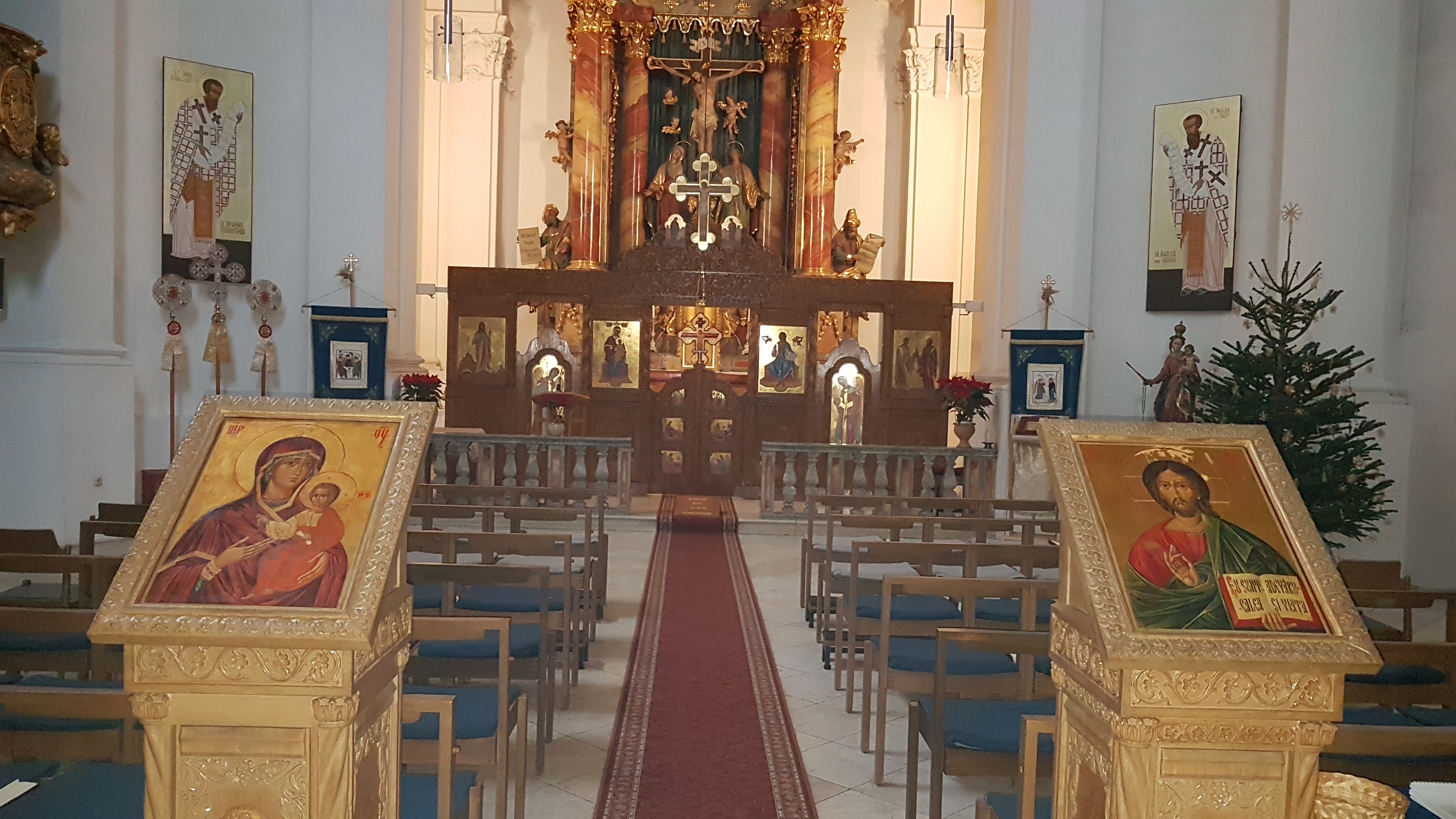 München, St. Elisabeth (Klinikviertel), russisch-orthodoxe Kirchenausstattung.